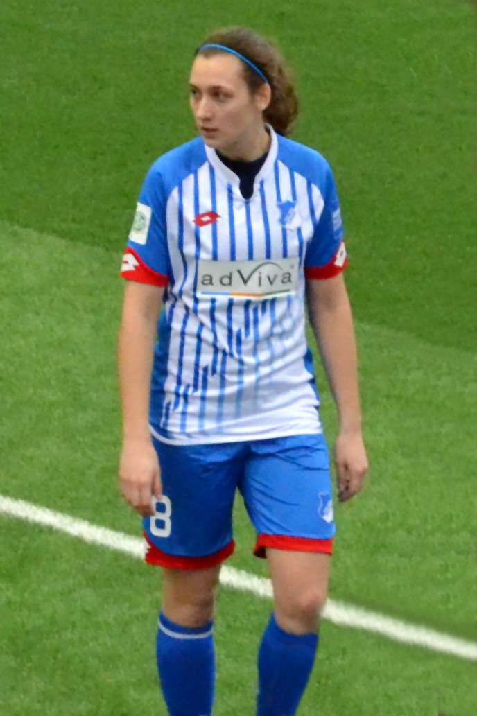 Christine Schneider (TSG 1899 Hoffenheim) beim SAP Frauen-FußballCup 2016